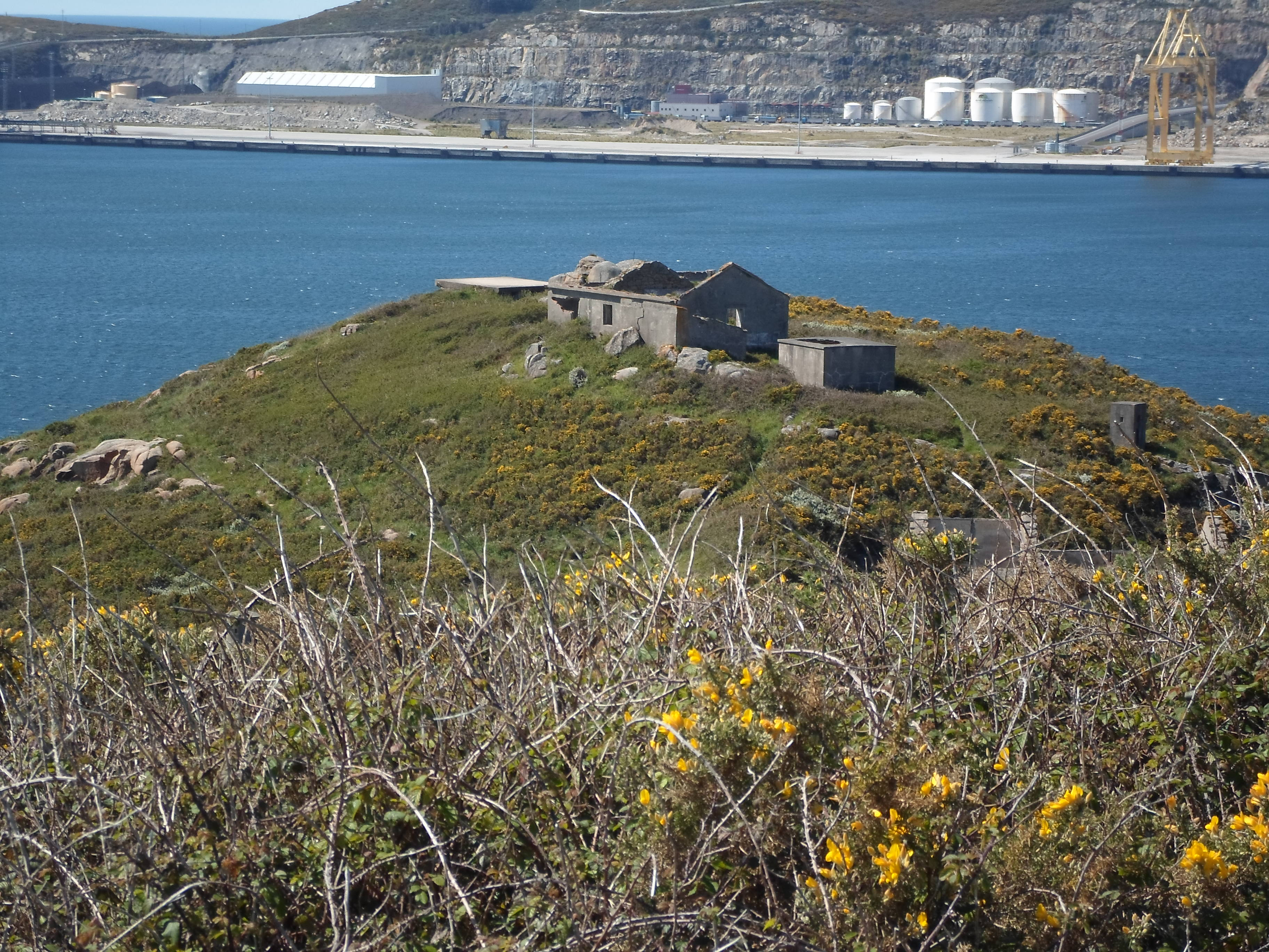 Antiguas baterías de costa en Ares (Galicia)